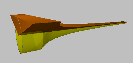 Volume de la trompette de Gabriel par la méthode de Cavalieri - Etape 2